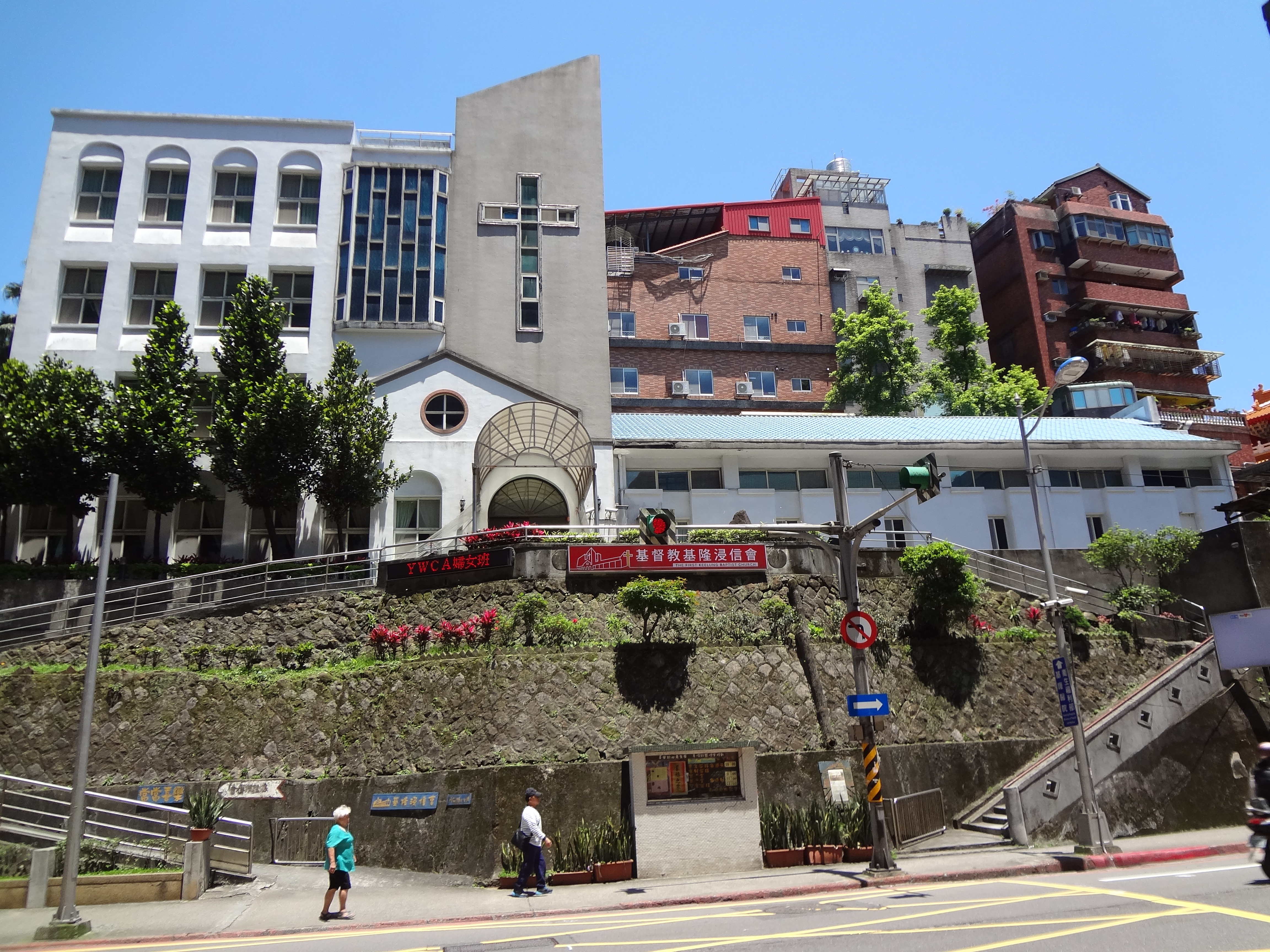 基督教基隆浸信會，地址：基隆市信義區信二路272號。